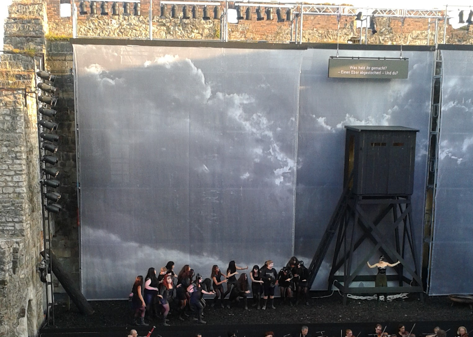 Opernfesspiele 2015: Macbeth